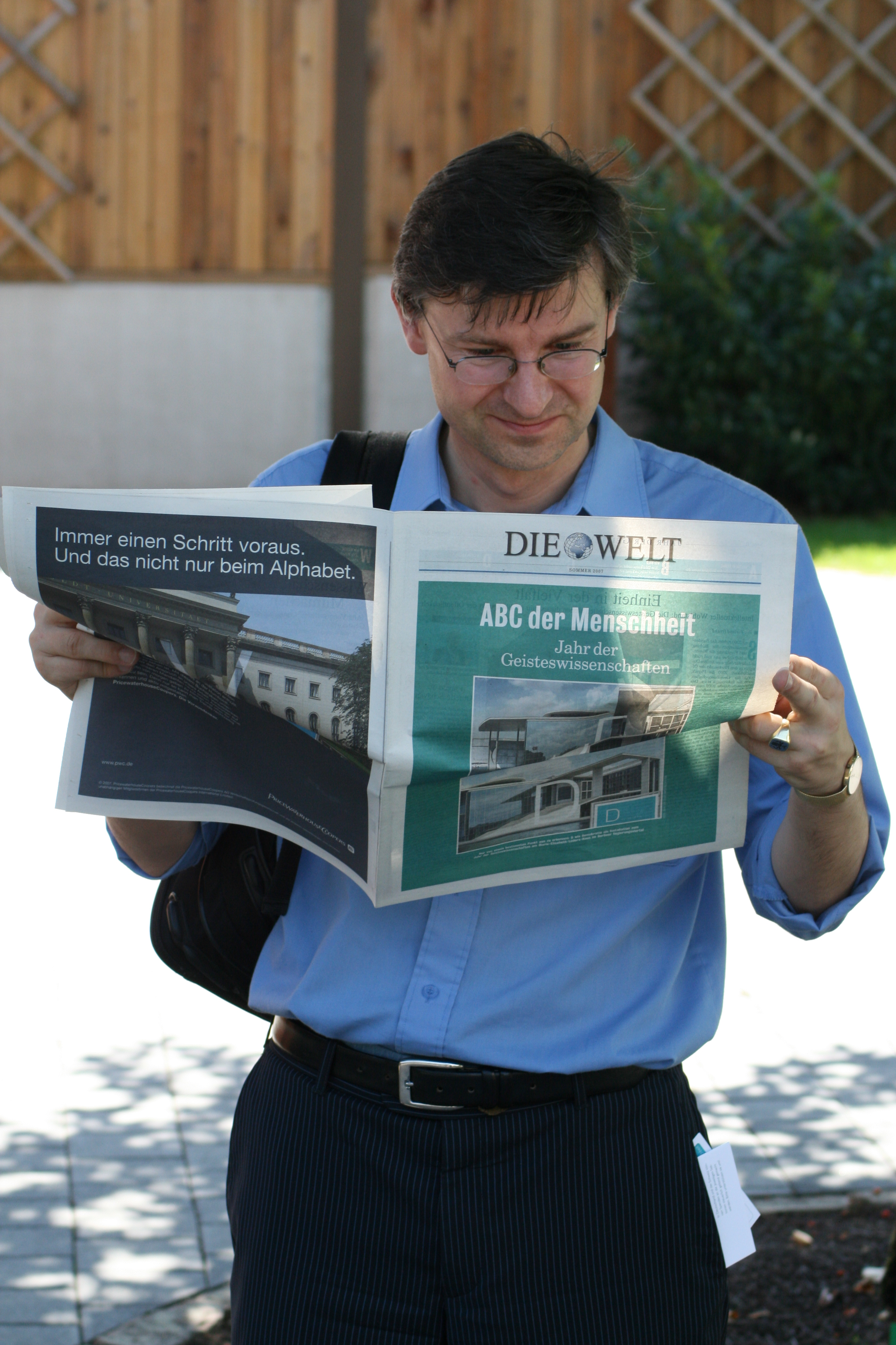 Wikipedia Academy 2007